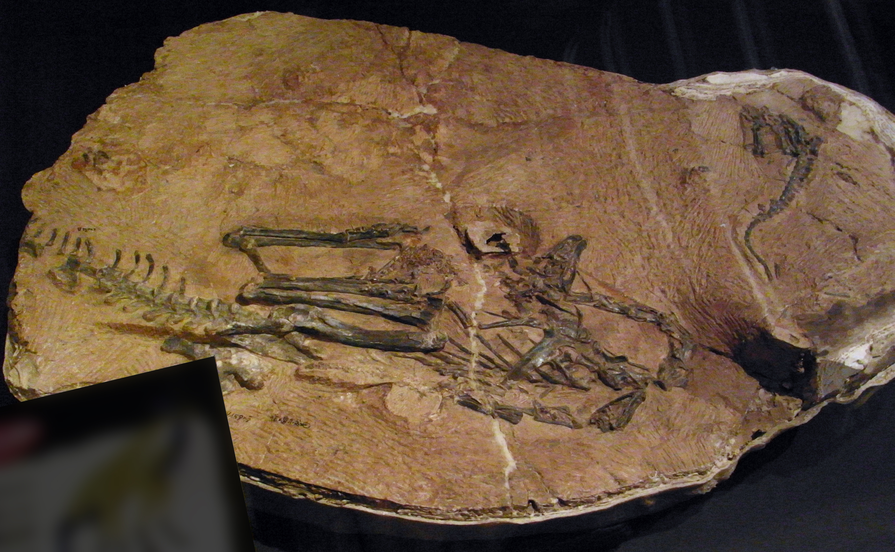 リムサウルス。 カラーリングがポケモンぽい。